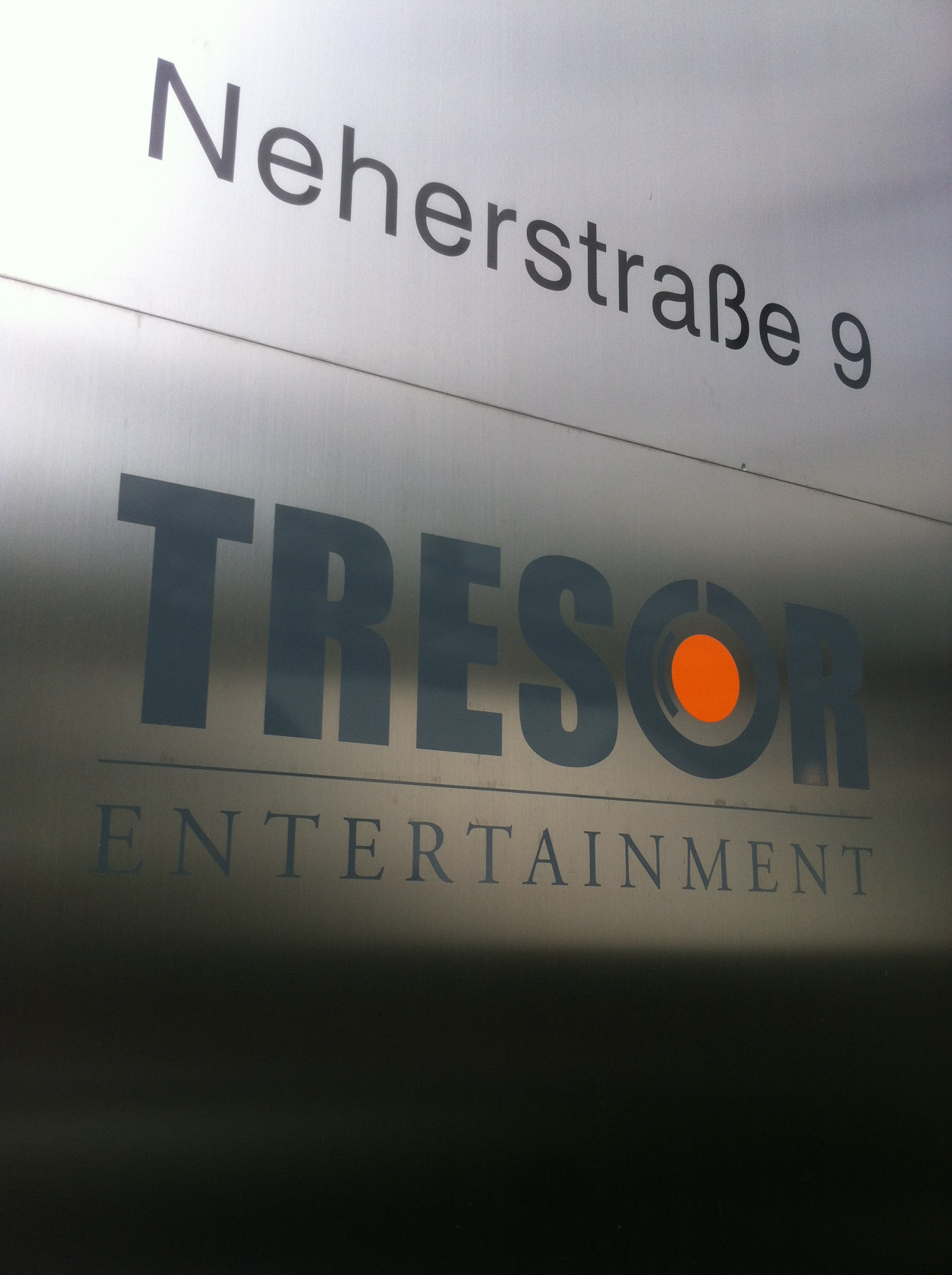 Eingangsbereich